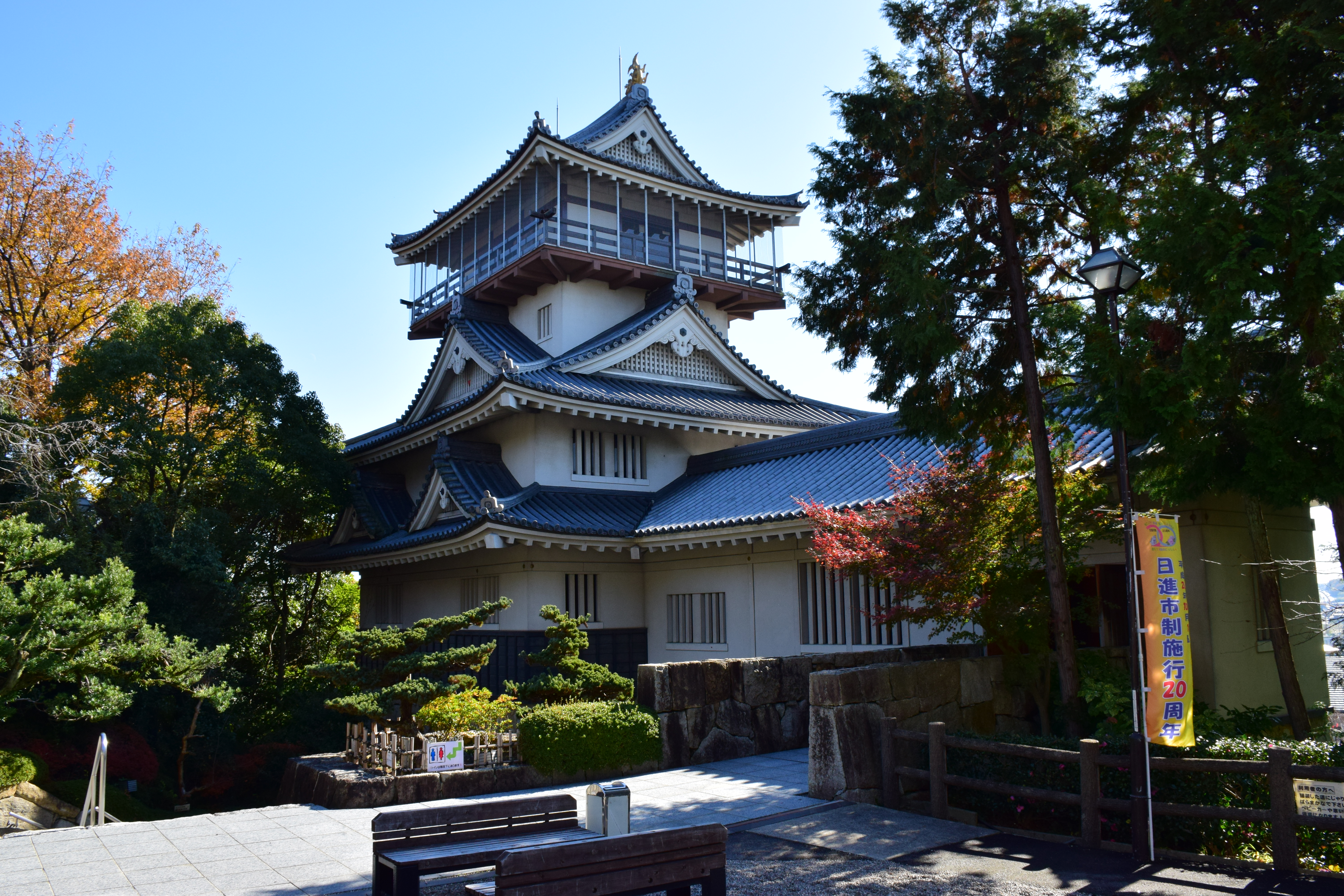 岩崎城周辺